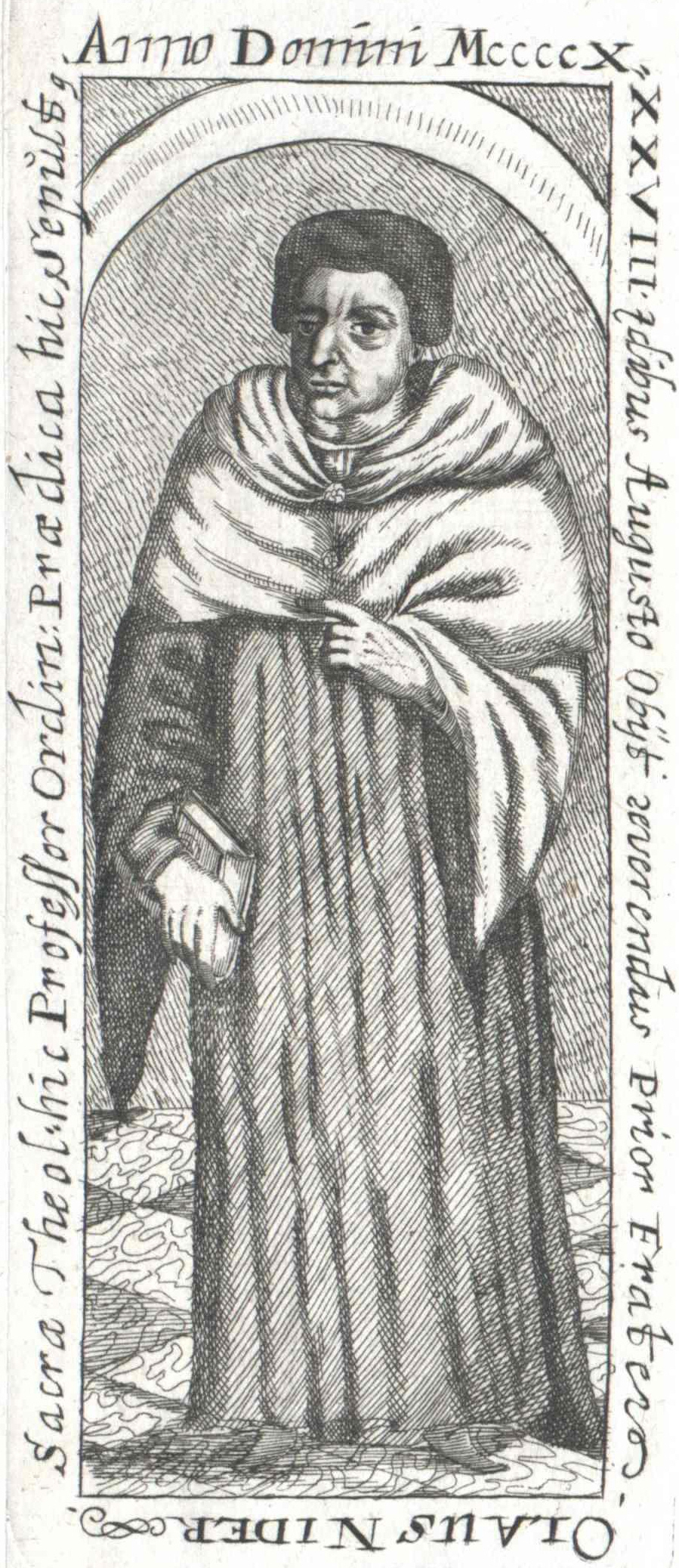 Porträt Johannes Nider Wien, Österreichische Nationalbibliothek, Bildarchiv und Grafiksammlung, Porträtsammlung, Inventar-Nr. PORT_00129243_01